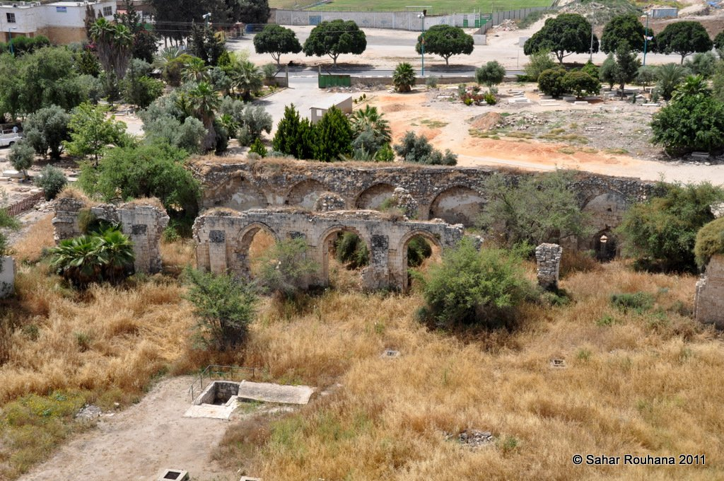 صورة قرية